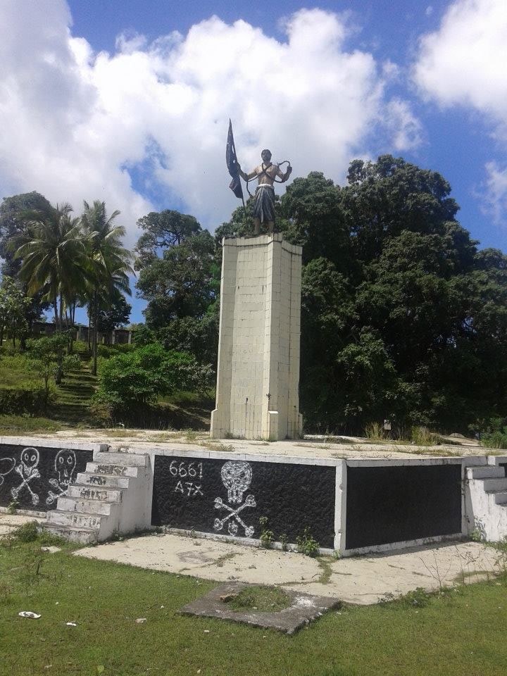 Der Ort Balibo